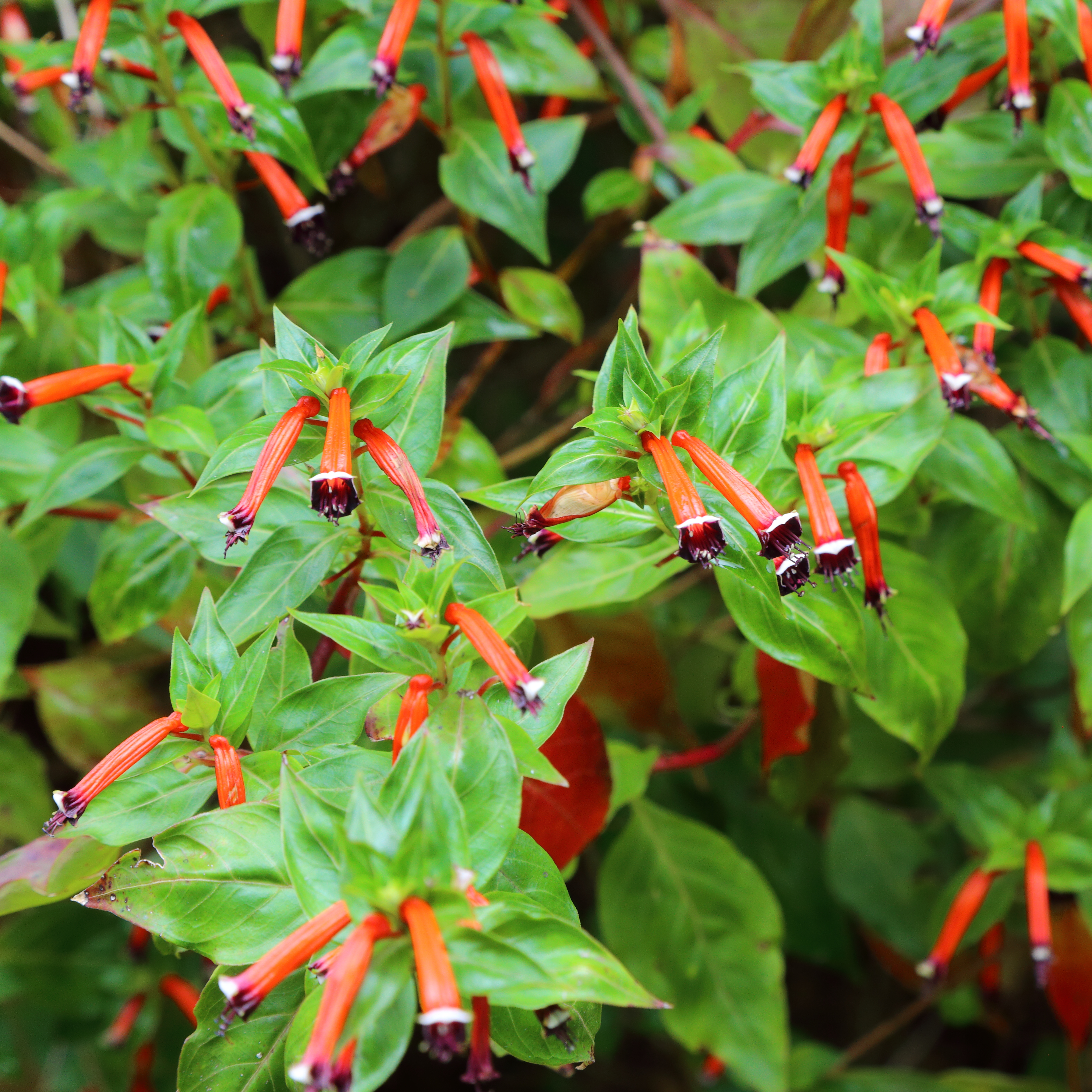 Cuphea ignea i parken Terra Nostra, Furnas, Azorerna.